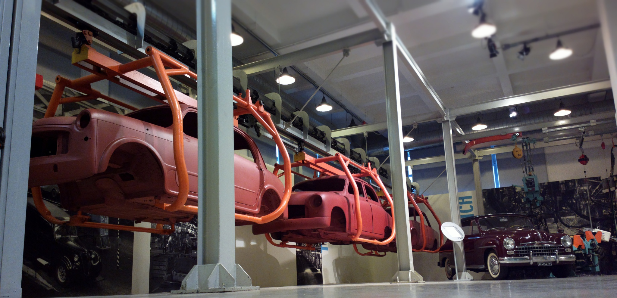 Frammento di linea di montaggio, proveniente dallo stabilimento di Mirafiori, in esposizione al Centro Storico Fiat